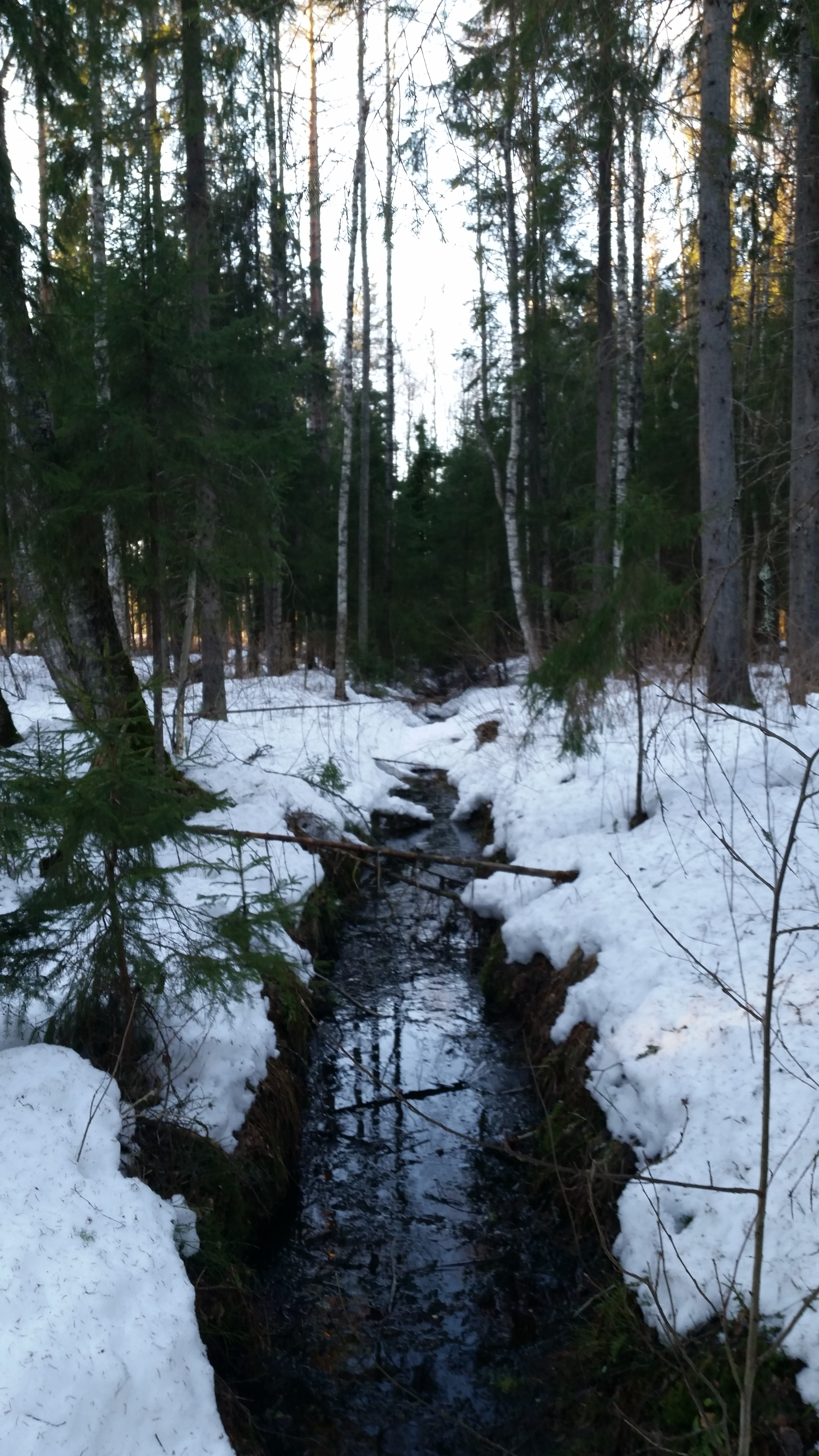 Rännikorven maastoa lähellä Kärjenlampea maaliskuussa 2015.